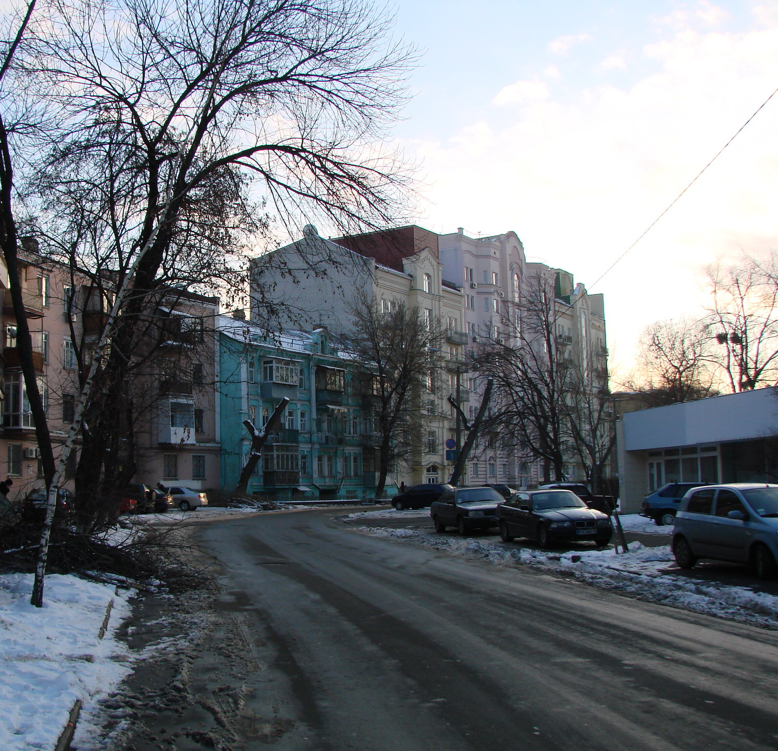 вул.Юрківська